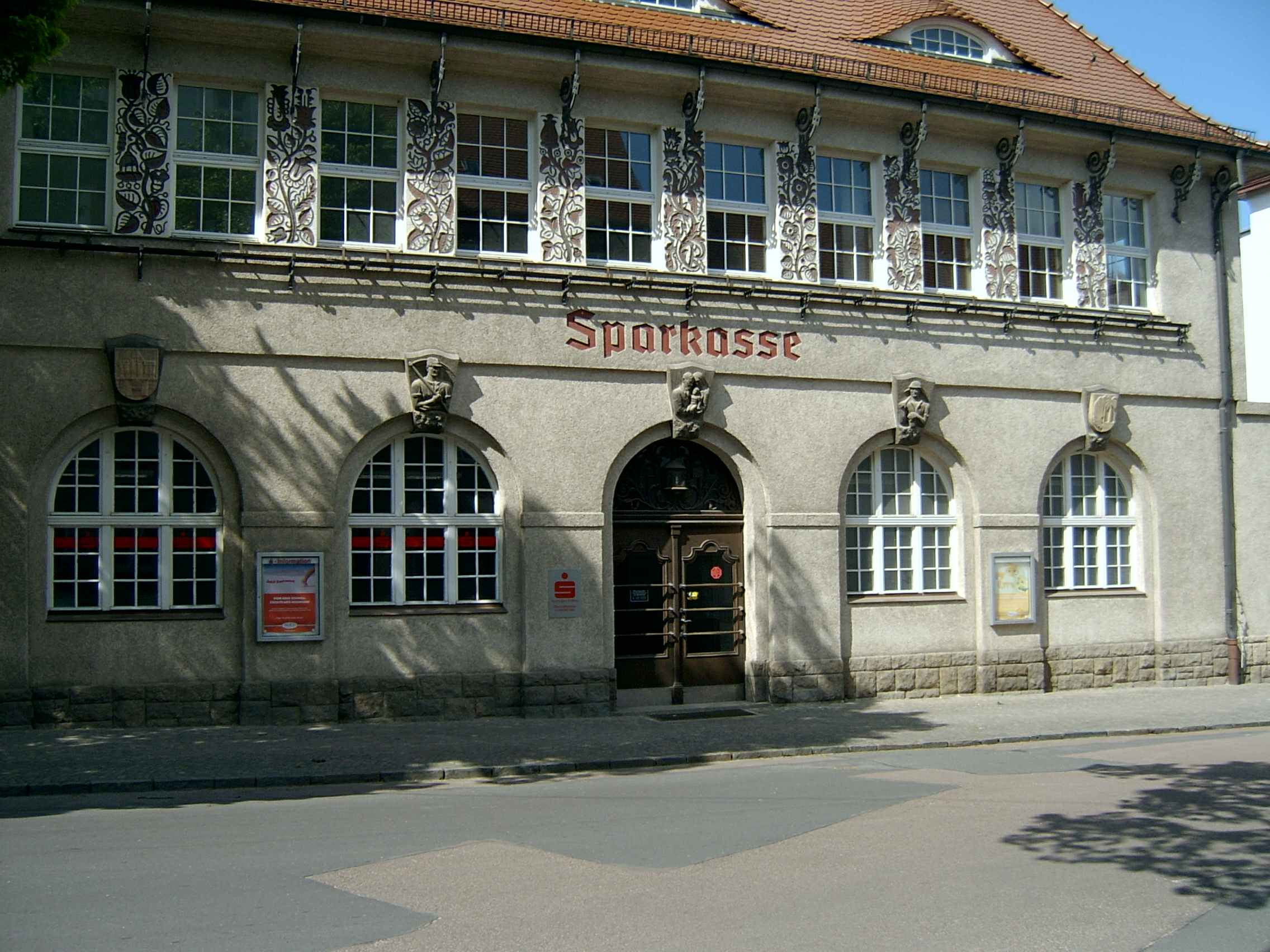 Altes Hauptgebäude der Kreissparkasse Köthen.